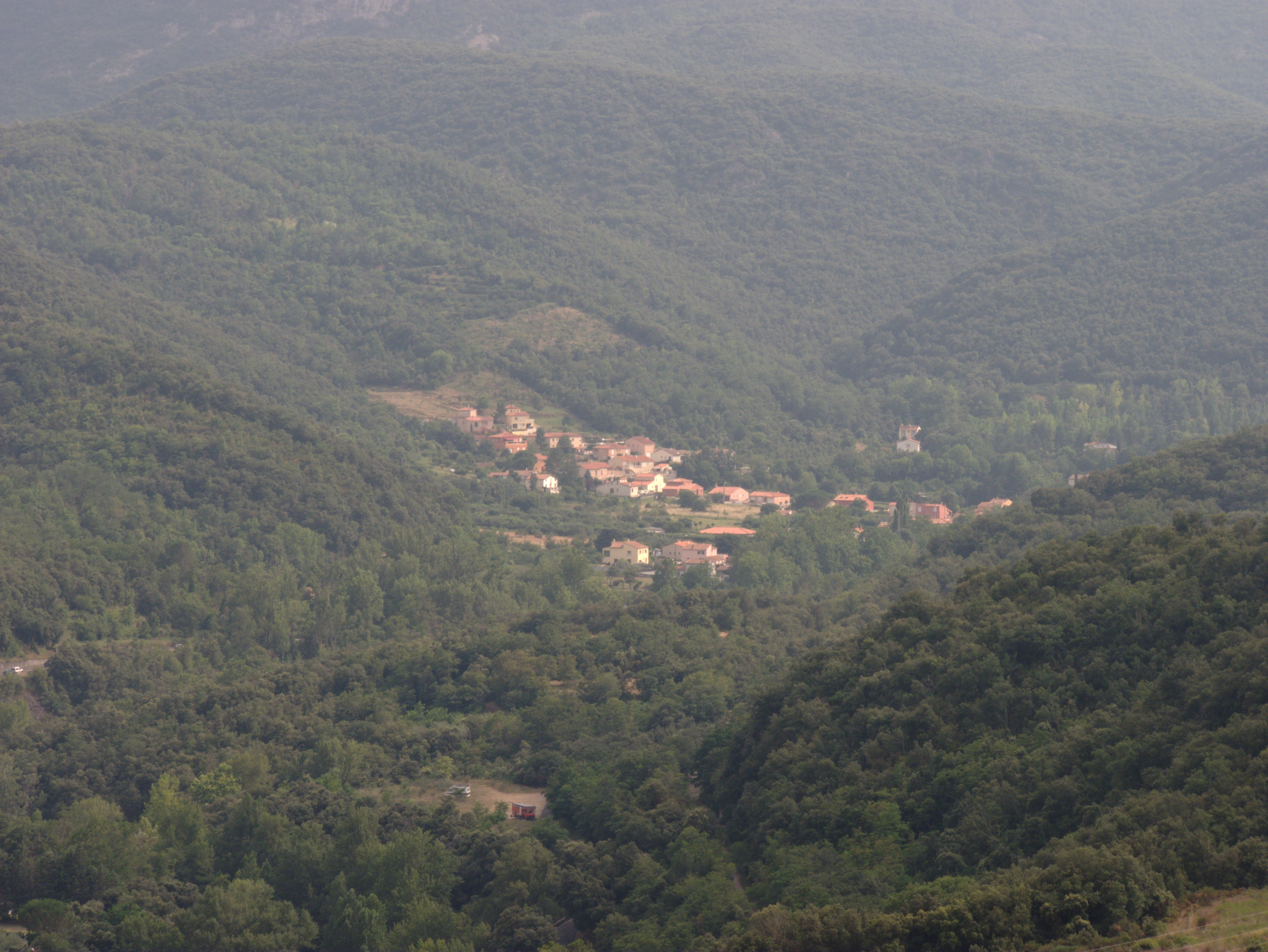 Vue générale de La Forge, Reynès (Pyrénées-Orientales, Languedoc-Roussillon, France)